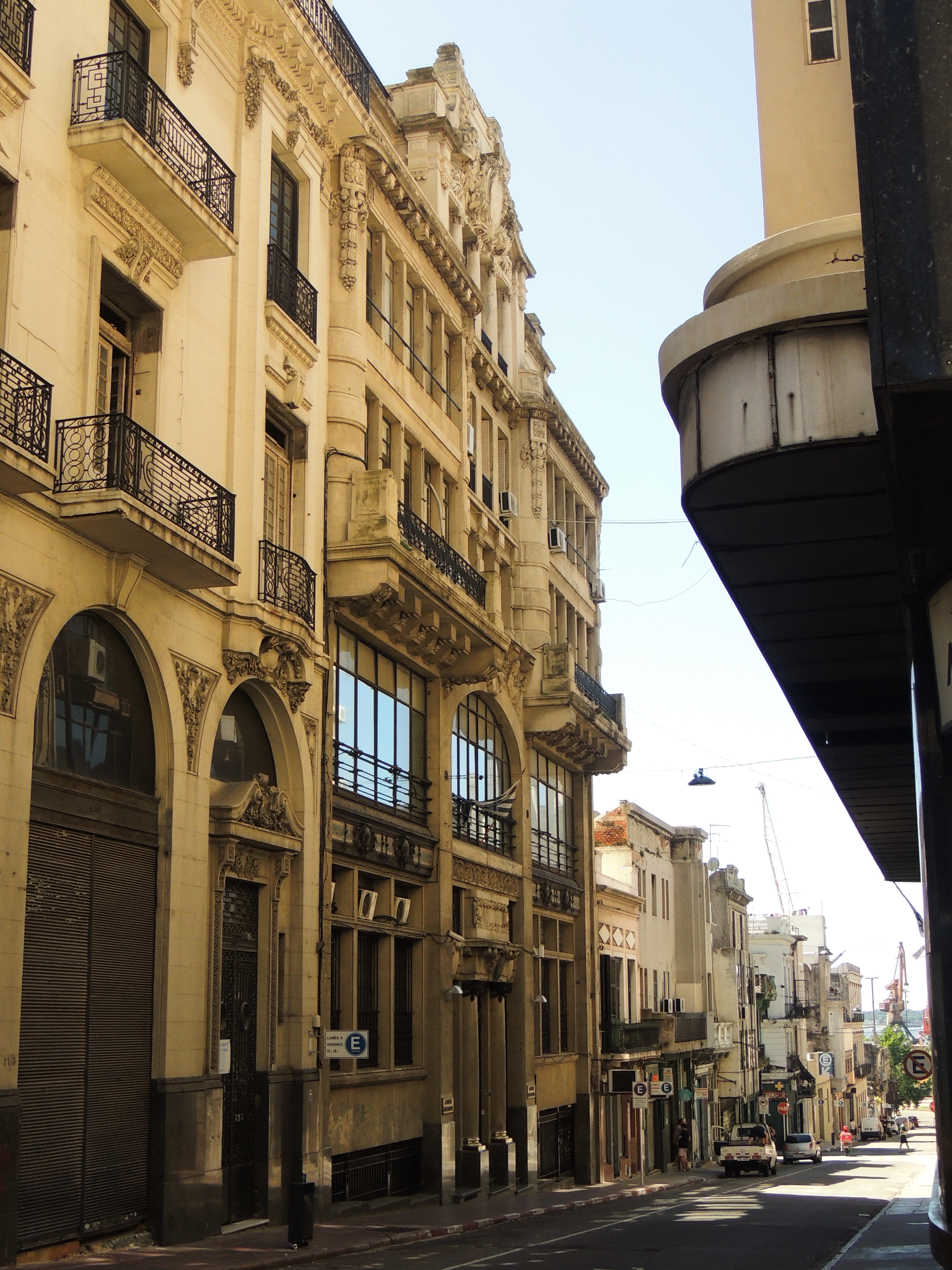 Gebäude des Wahlgerichts ("Corte Electoral") in Montevideo, Uruguay.